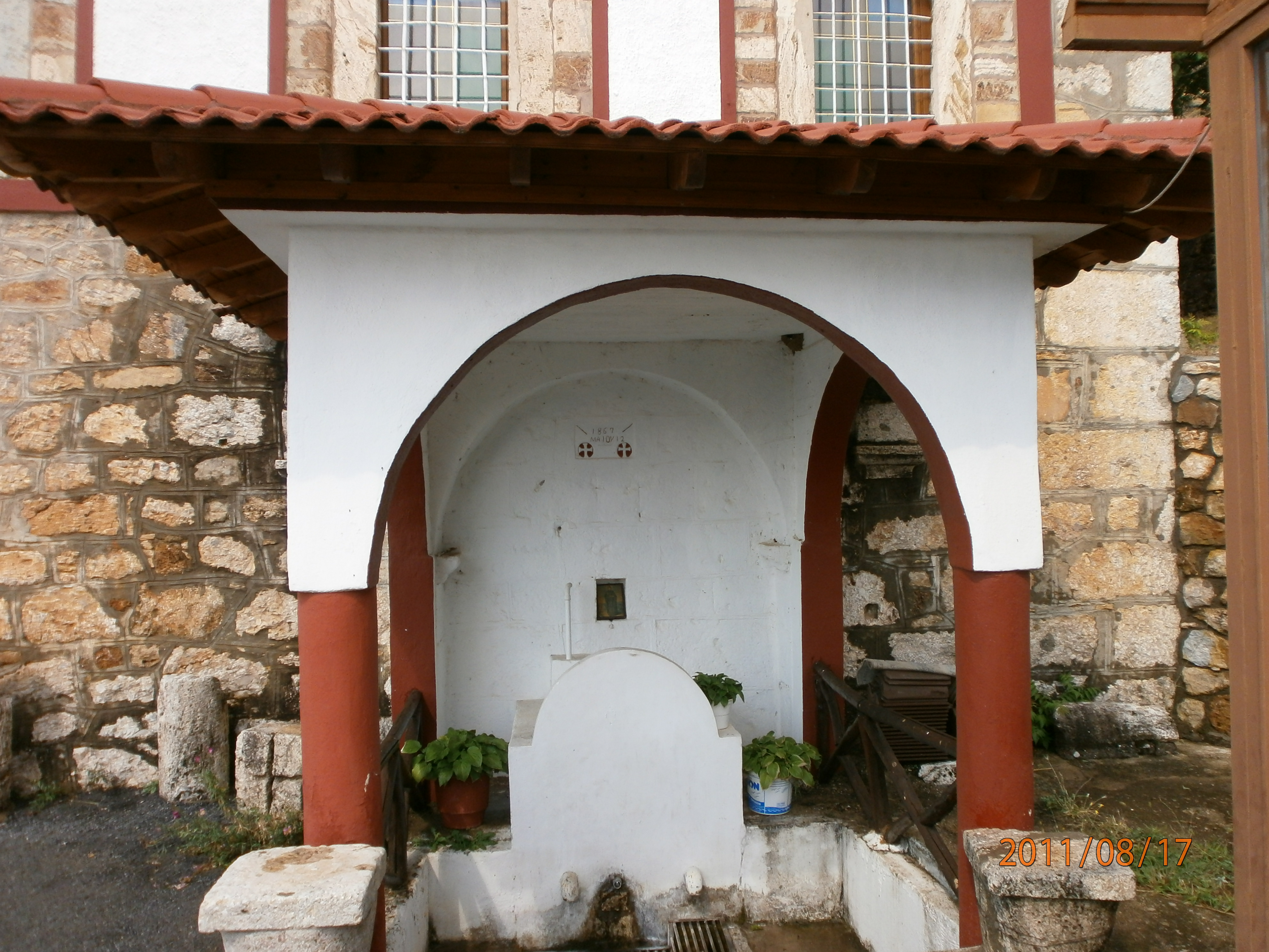 Чешмата Кланца